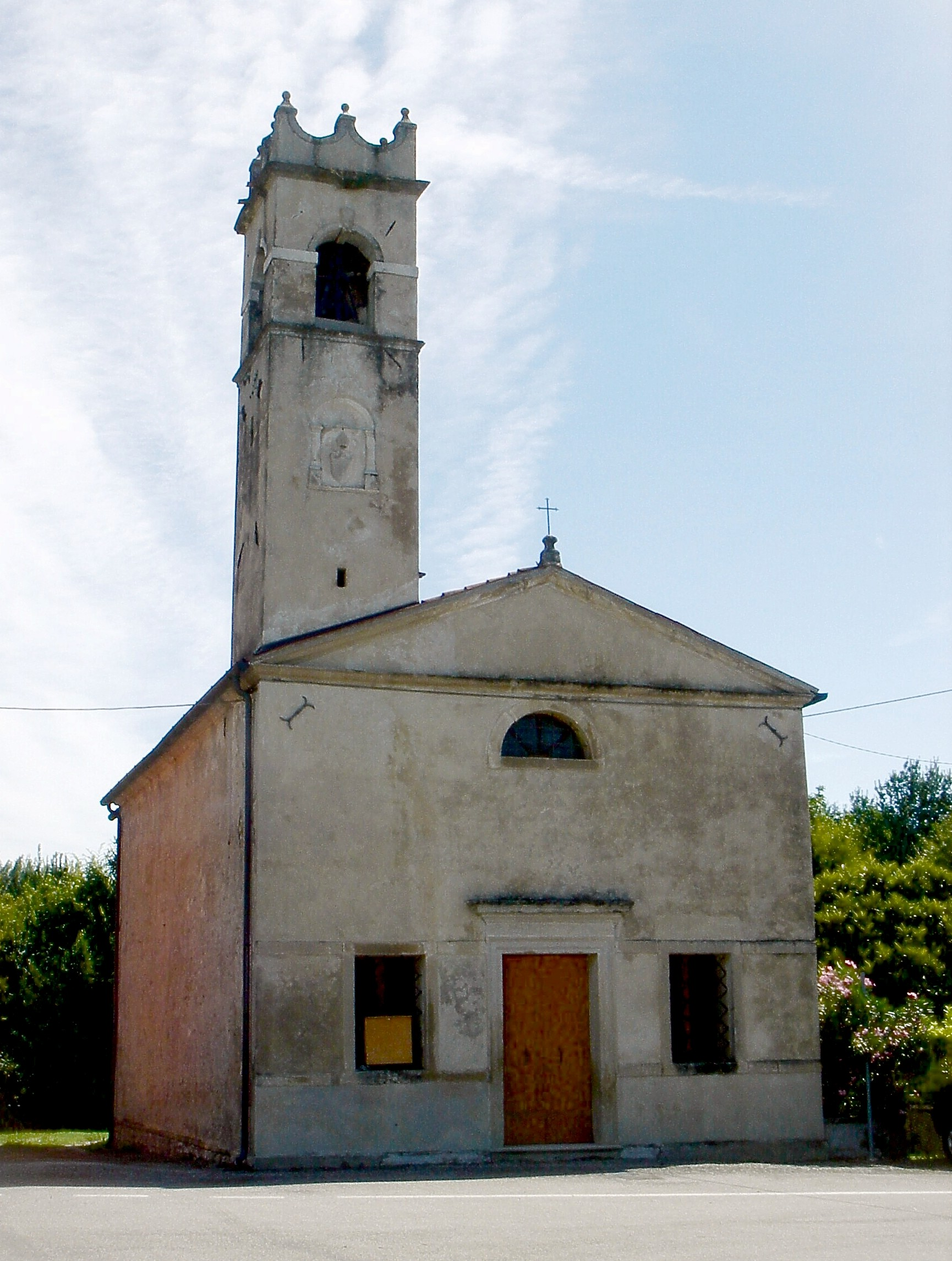 Colle Umberto (Treviso, Italia): la chiesa di San Sebastiano presso l'omonimo borgo.